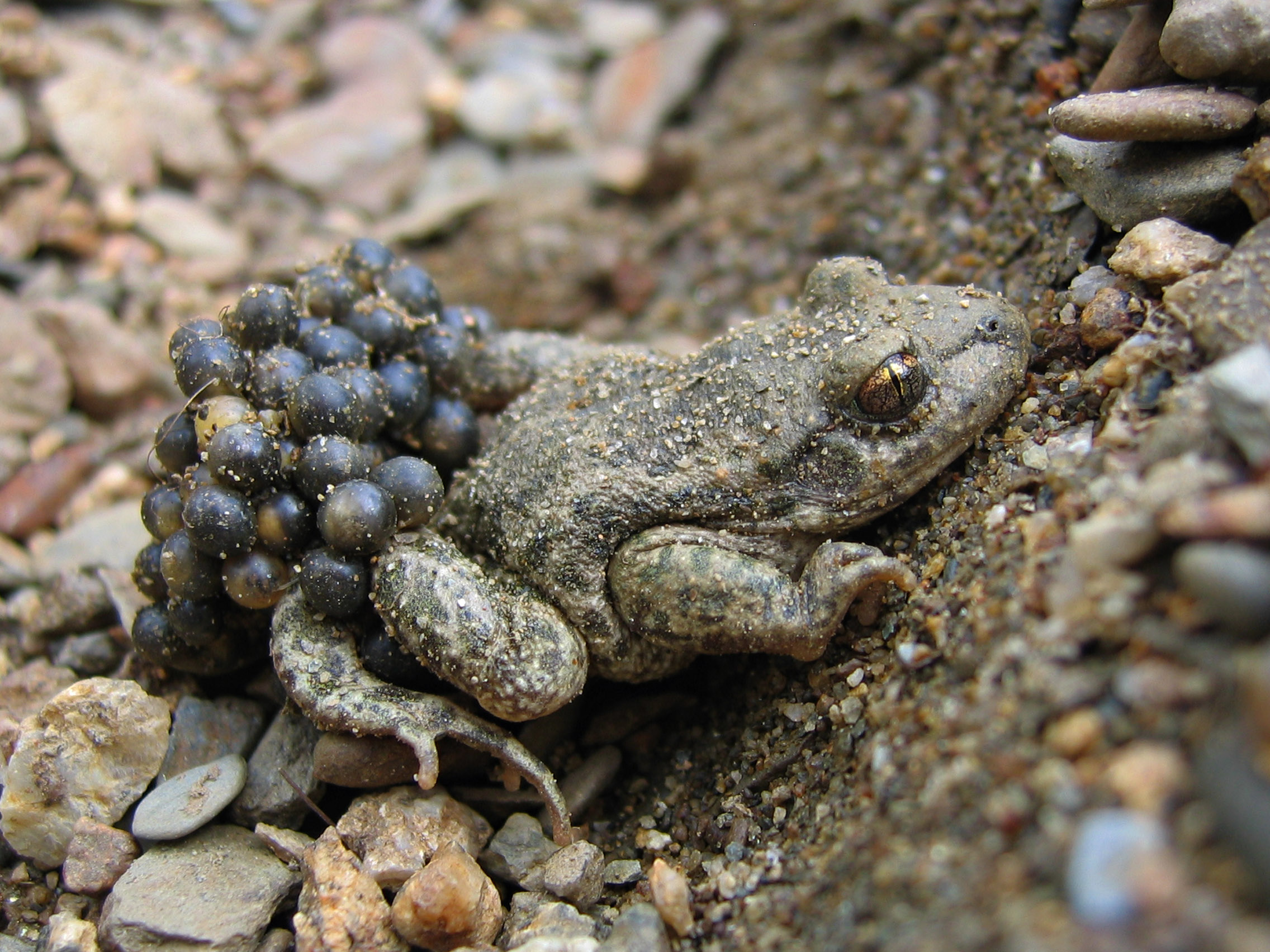 Alytes obstetricans almogavarii (Pyrénées Orientales 66)